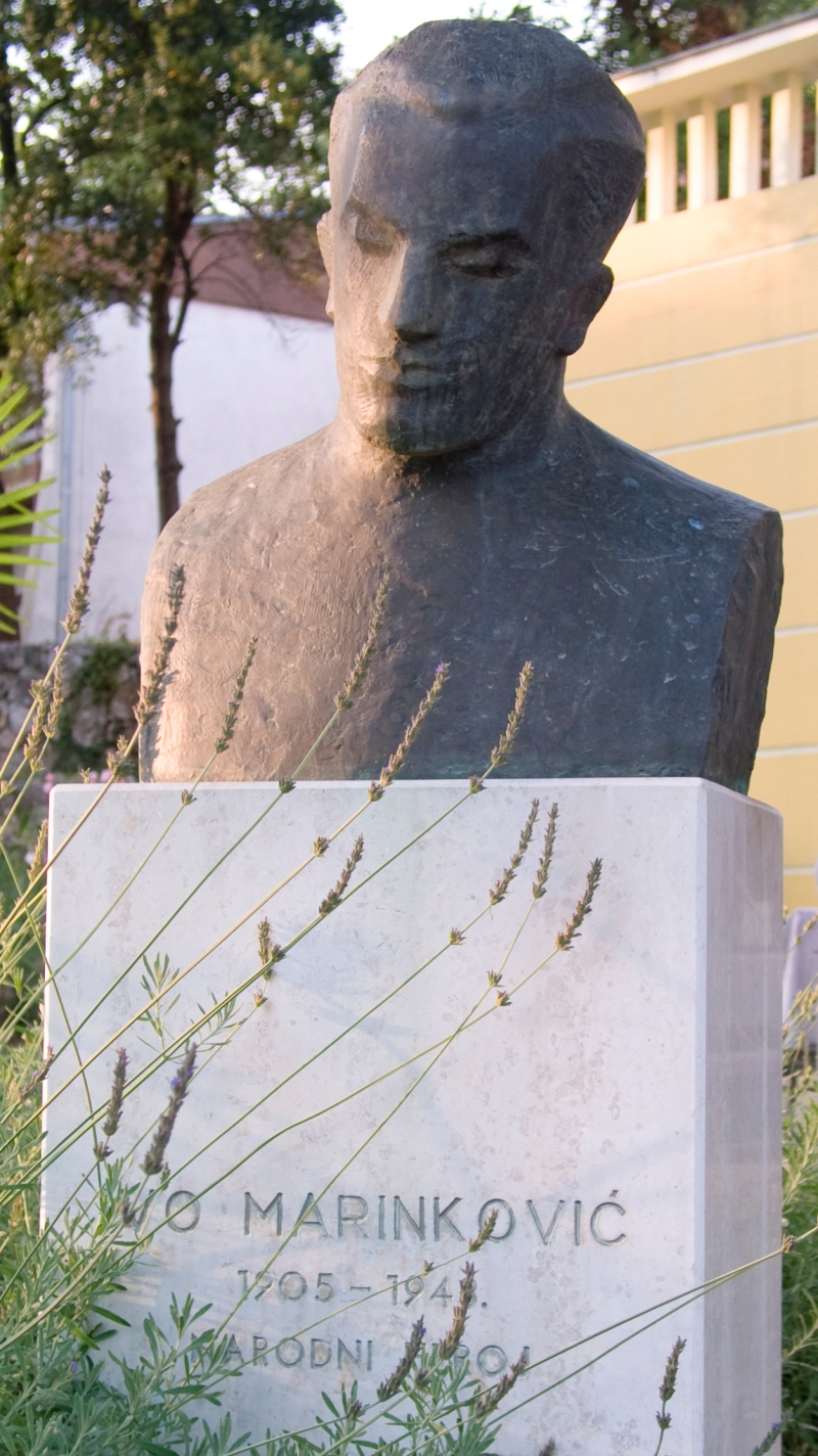 spomenik Ivi Marinkoviću u Crikvenici